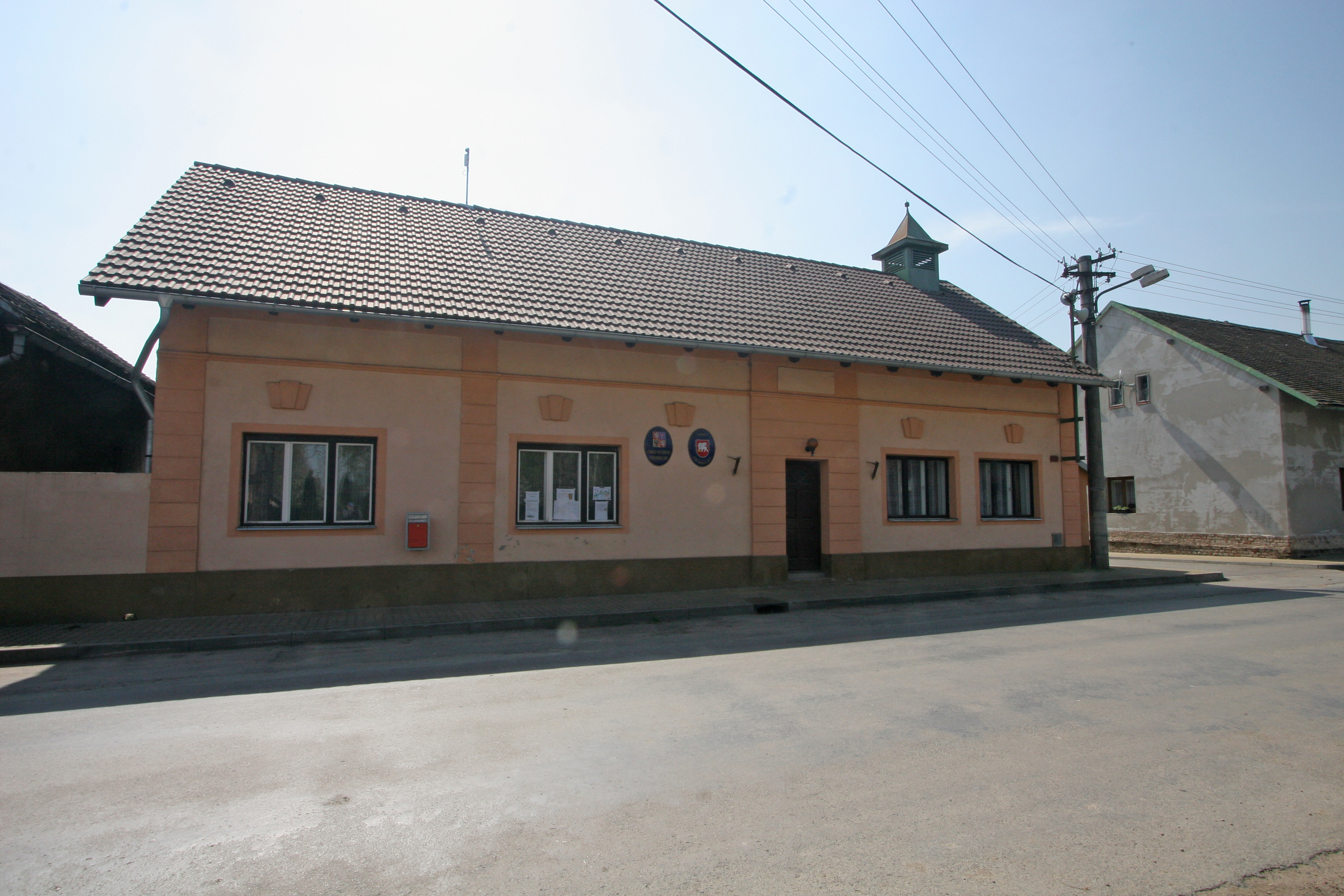 Třibřichy obecní úřad